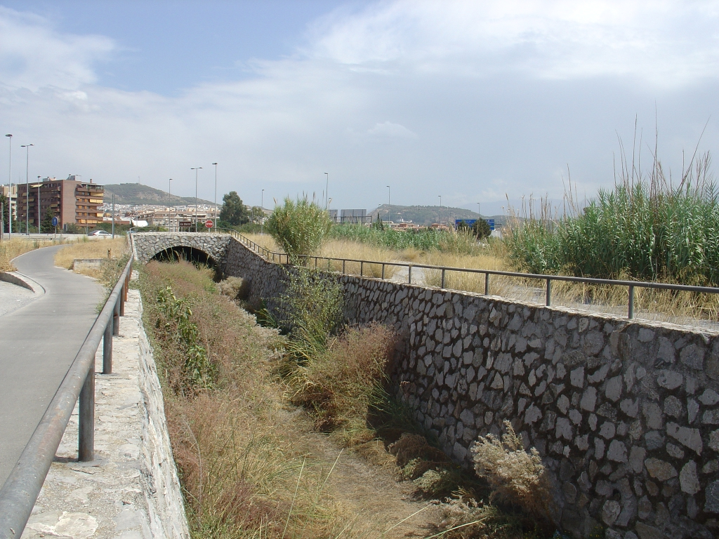 Río Beiro a su salida de la ciudad de Granada, donde ha transcurrido soterrado. Esta fotografía fue realizada en el mes de septiembre y el cauce del río estaba lleno de matorrales secos. No se veía agua en la superficie. El cauce está obrado en todo su recorrido hasta su desembocadura en el río Genil. Desde su salida de la ciudad hasta su encuentro con el río Genil el río va encajonado entre dos caminos por los que pueden circular vehículos. Además, en su margen derecho, siguiendo el curso del río, y por tanto, izquierdo en la imagen, hay un carril para peatones y bicicletas que lleva hasta el río Genil, que se encuentra a poca distancia (aproximadamente a tres kilómetros).